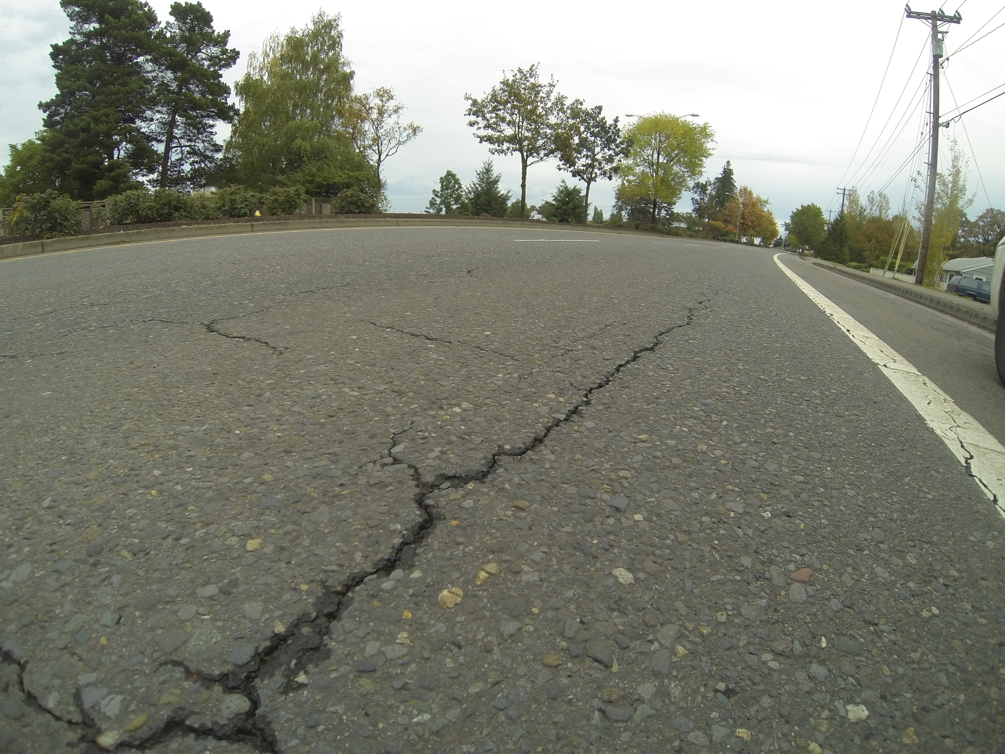 Pavement cracks